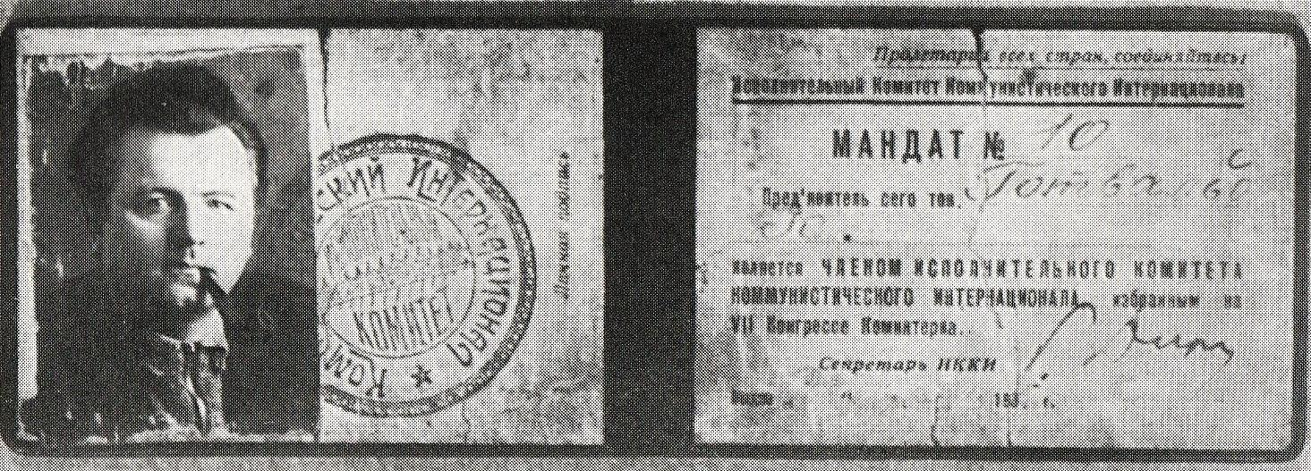 Gottwaldova průkazka coby člena komunistické internacionály z roku 1935. [bližší informace o době, kdy Gottwald byl členem EKI]